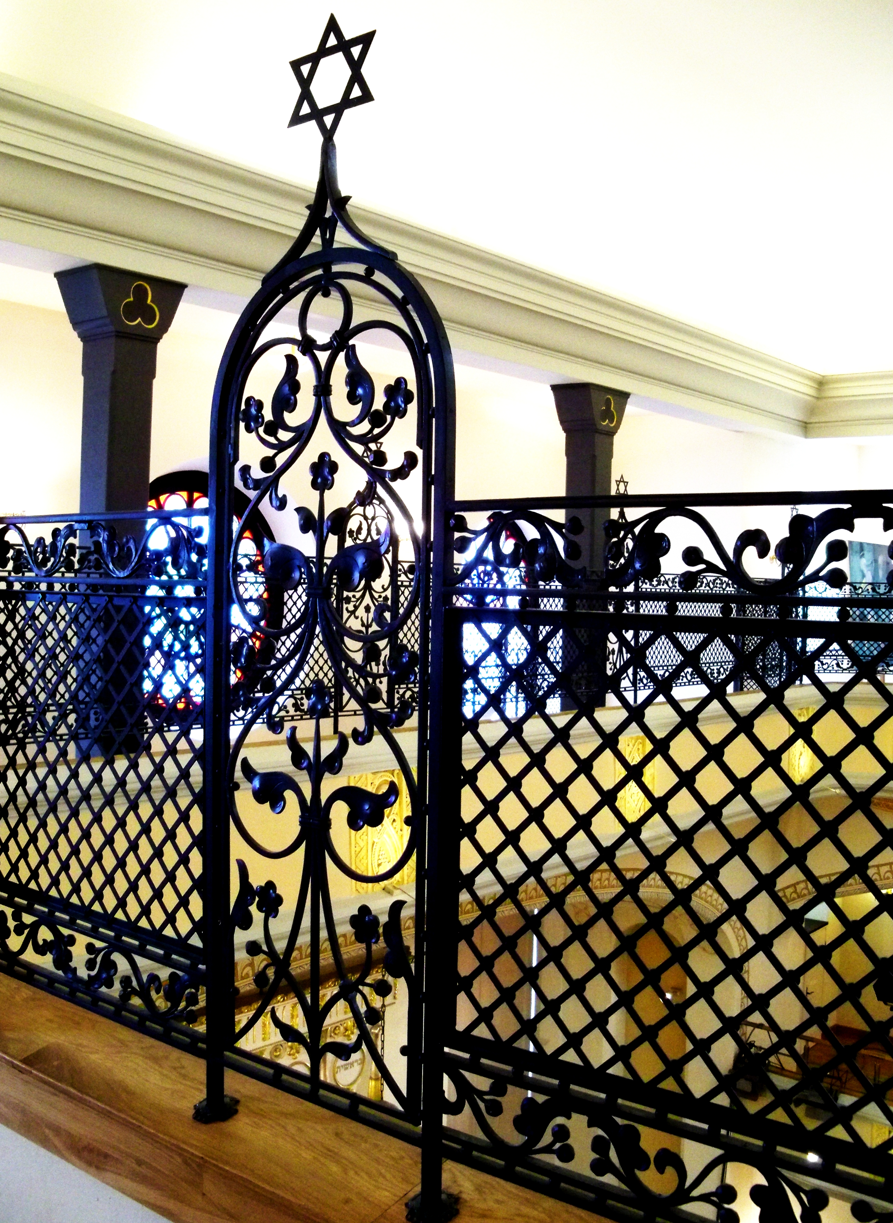 Synagoga pod Białym Bocianem – Wrocław